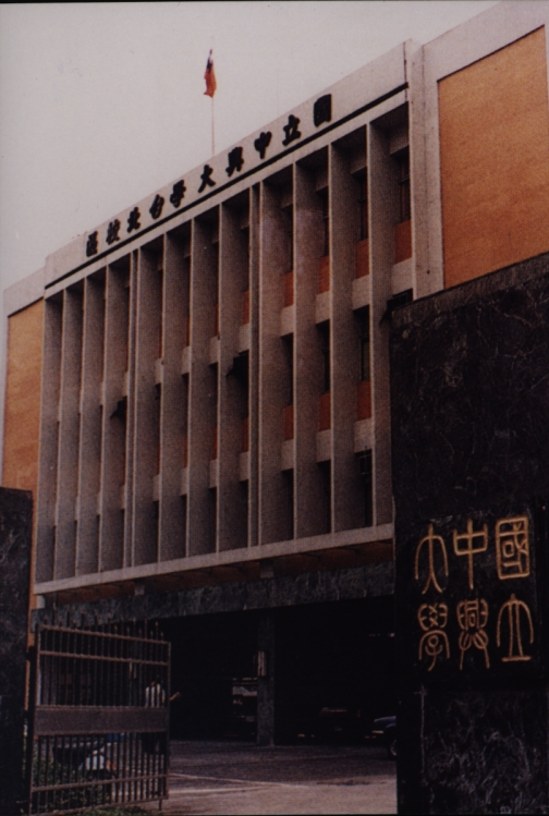 中文（台灣）: 國立中興大學法商學院時期老照片